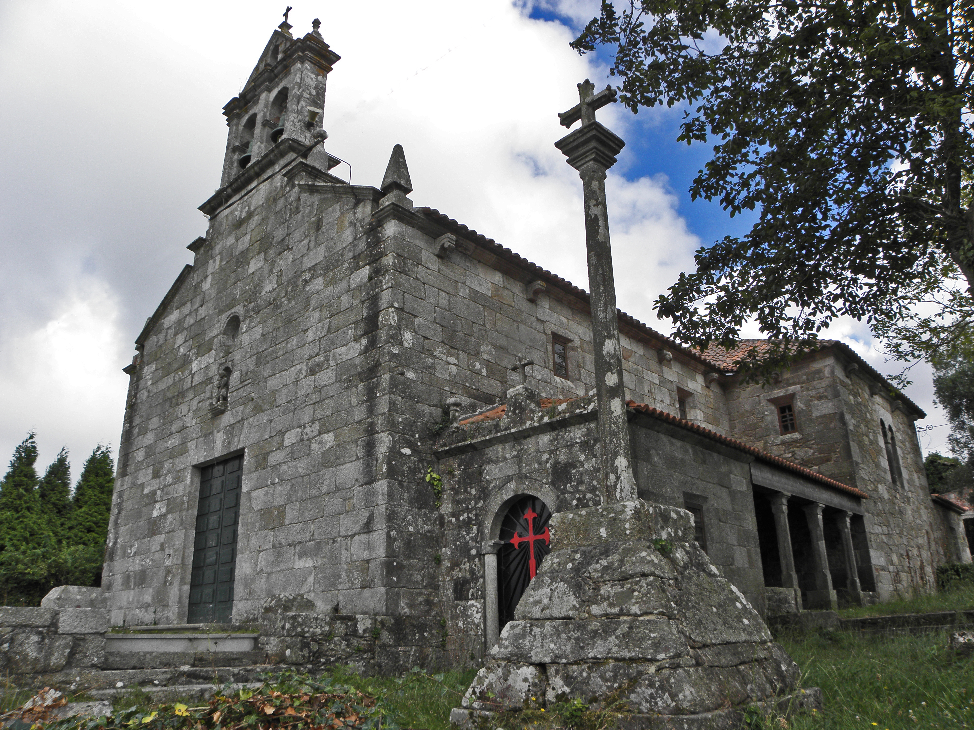 Igrexa de San Xoán de Xornes, Ponteceso